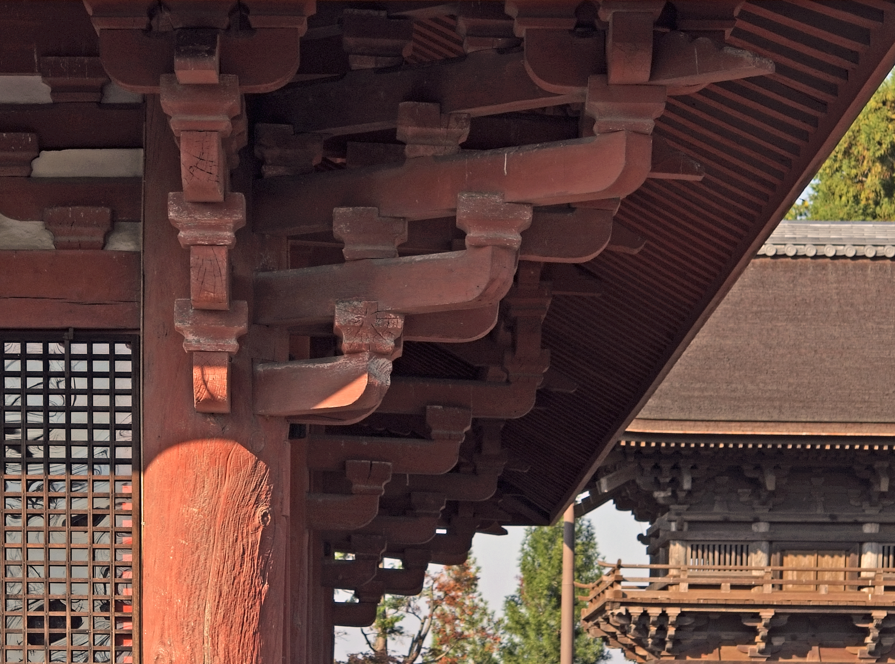 Jodo-ji Jododo